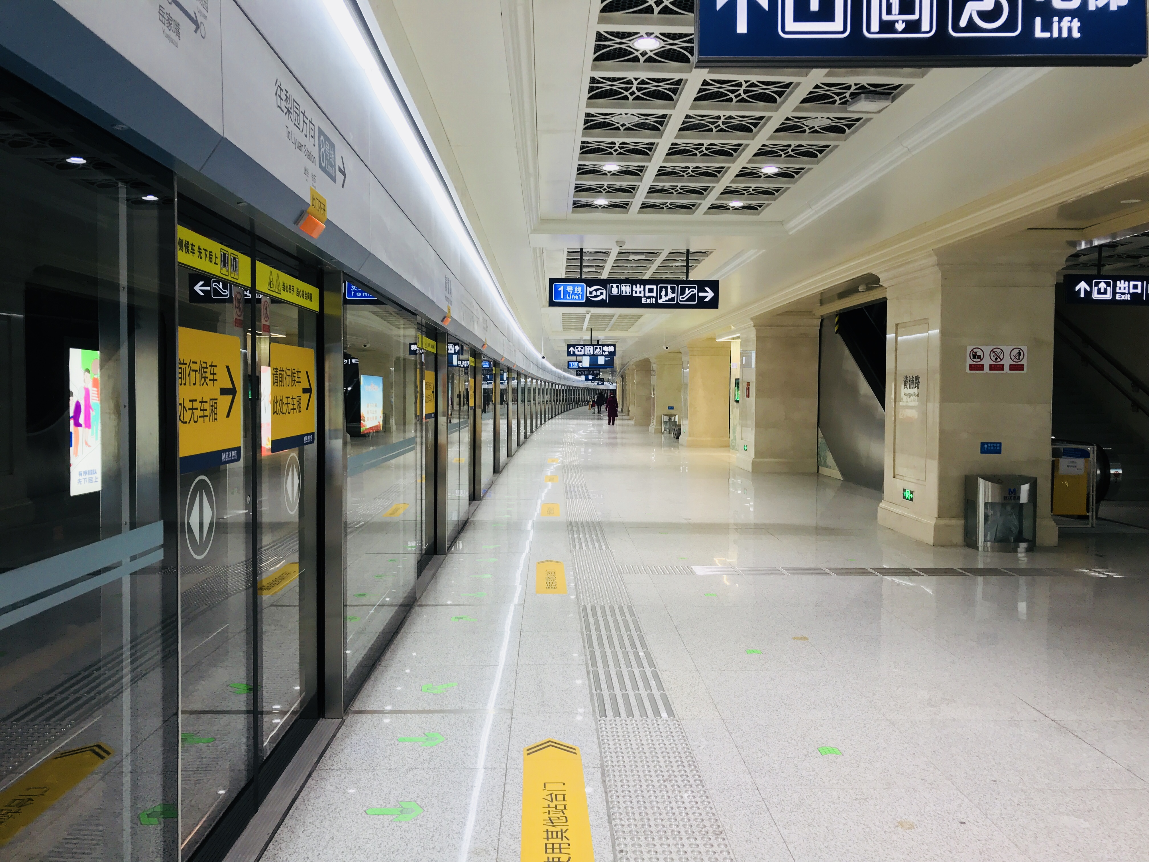 武汉地铁黄浦路站